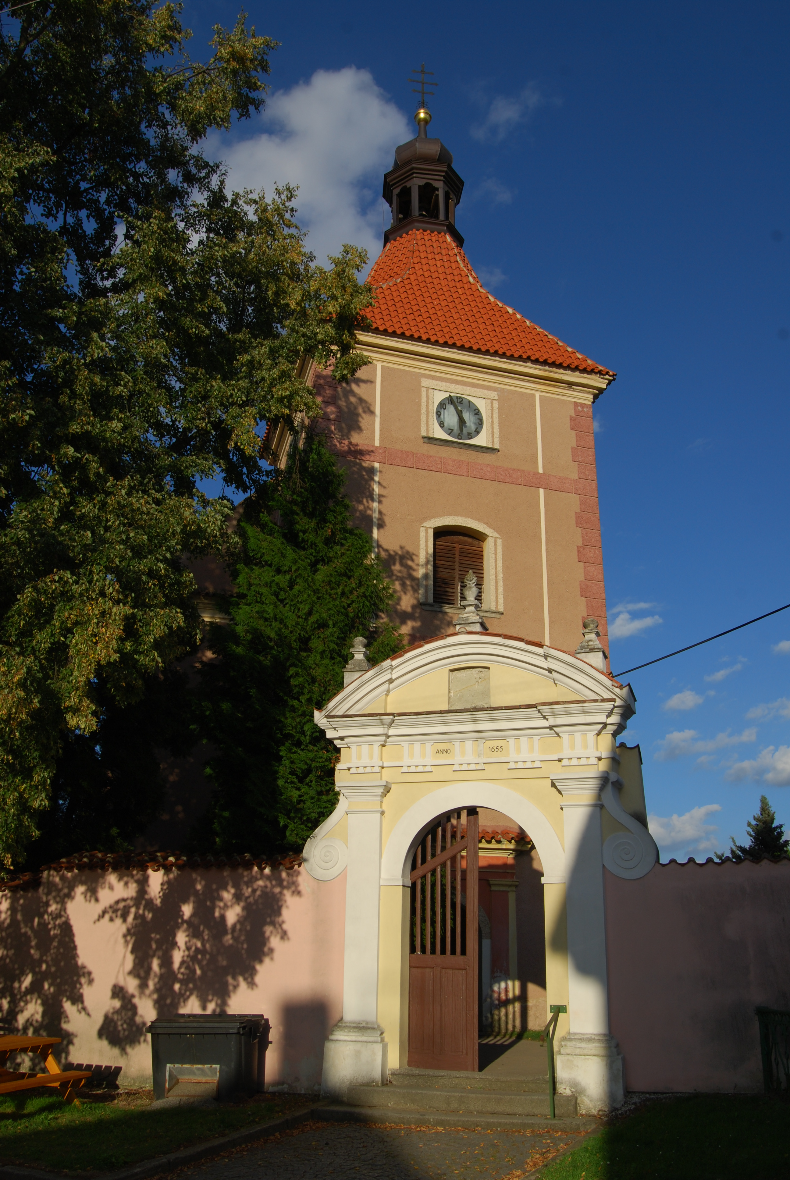 Kostel sv. Prokopa. Orlík nad Vltavou. Okres Písek. Česká republika.